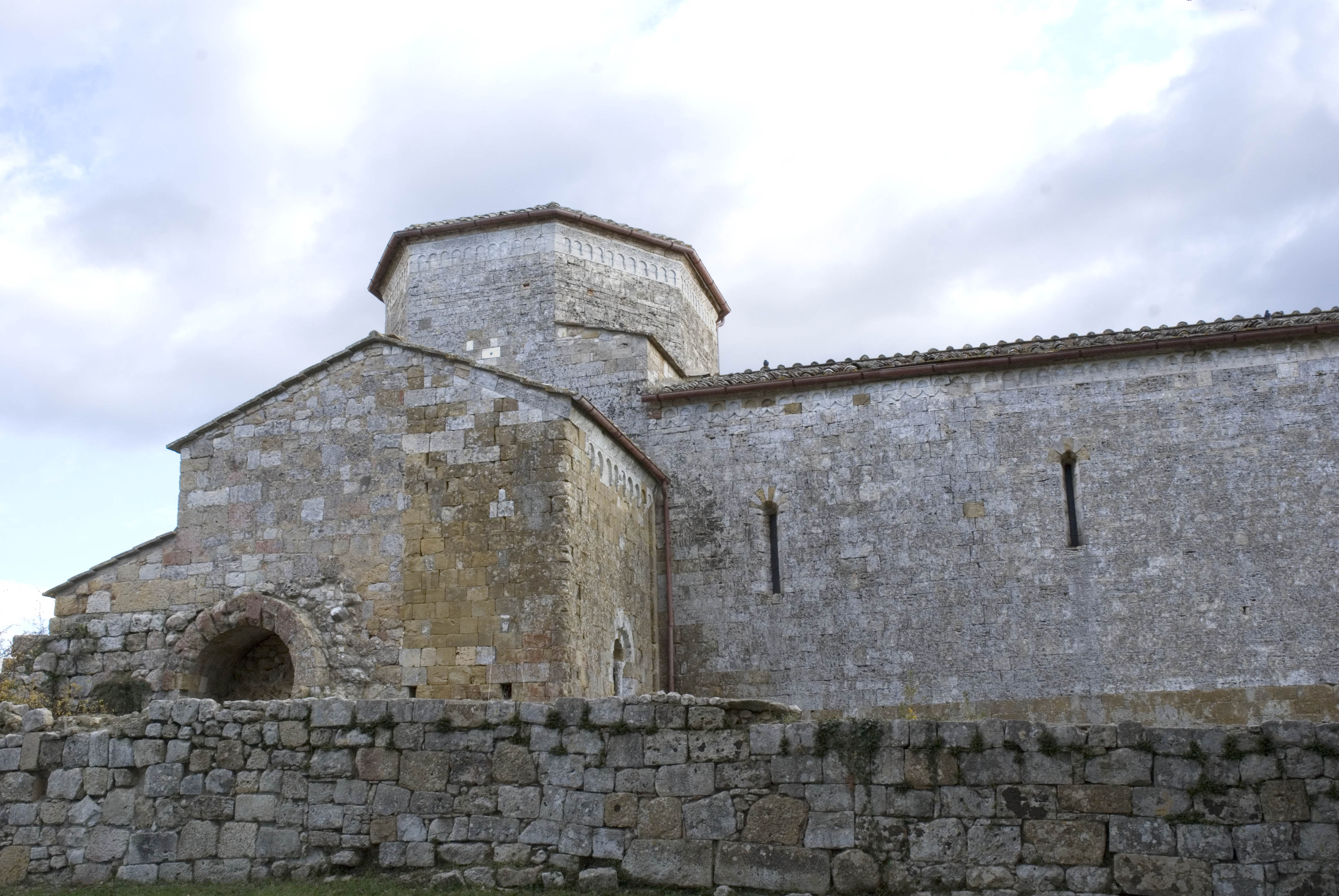 abbazia di santa maria assunta a coneo